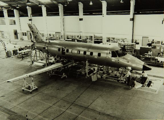 Embraer CBA-123 в сборочном цехе